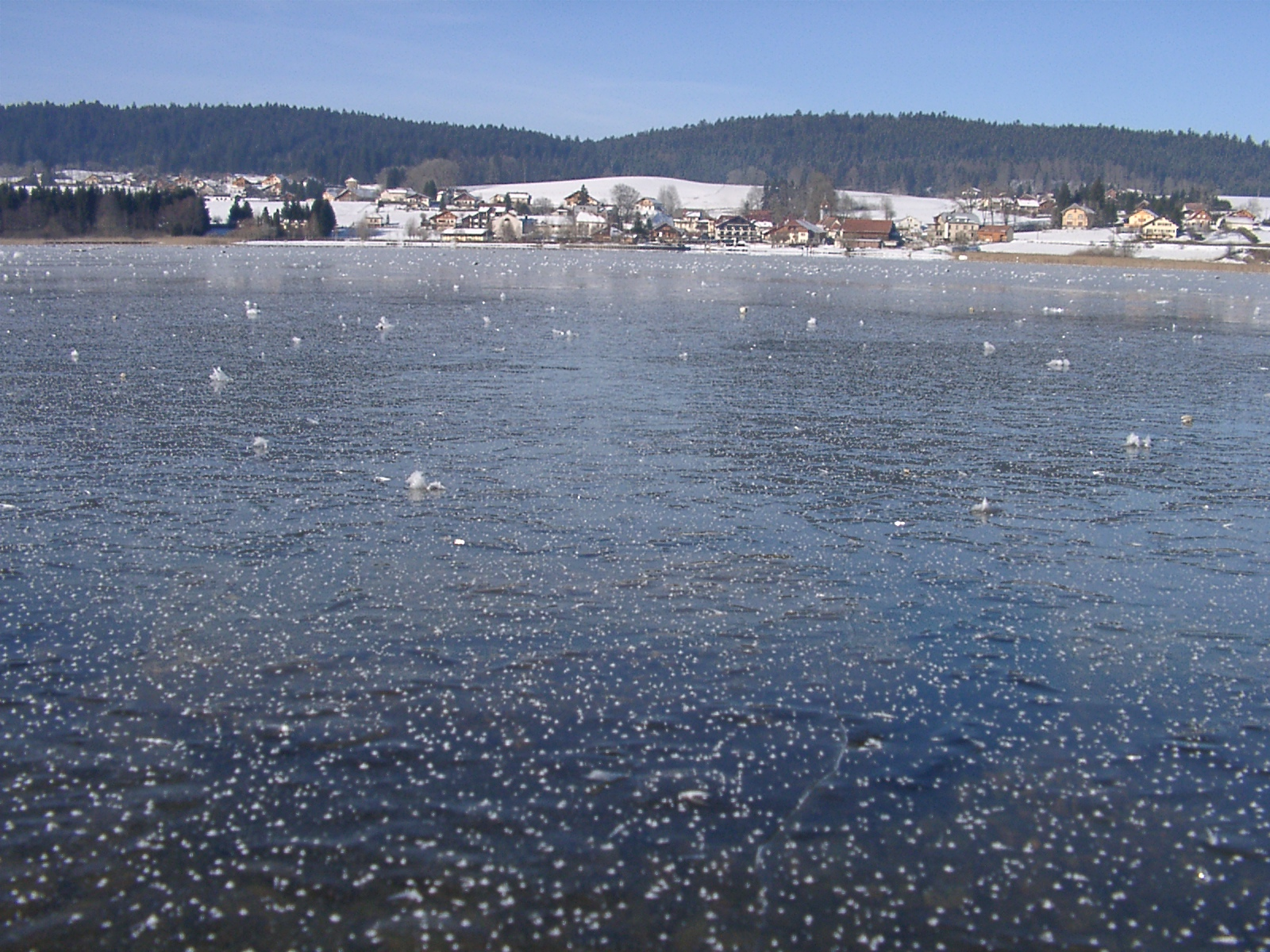 Auteur: Utilisateur:Suaudeau Description: Vue de la commune de Saint-Point-Lac avec le lac de Saint-Point gelé en premier plan.